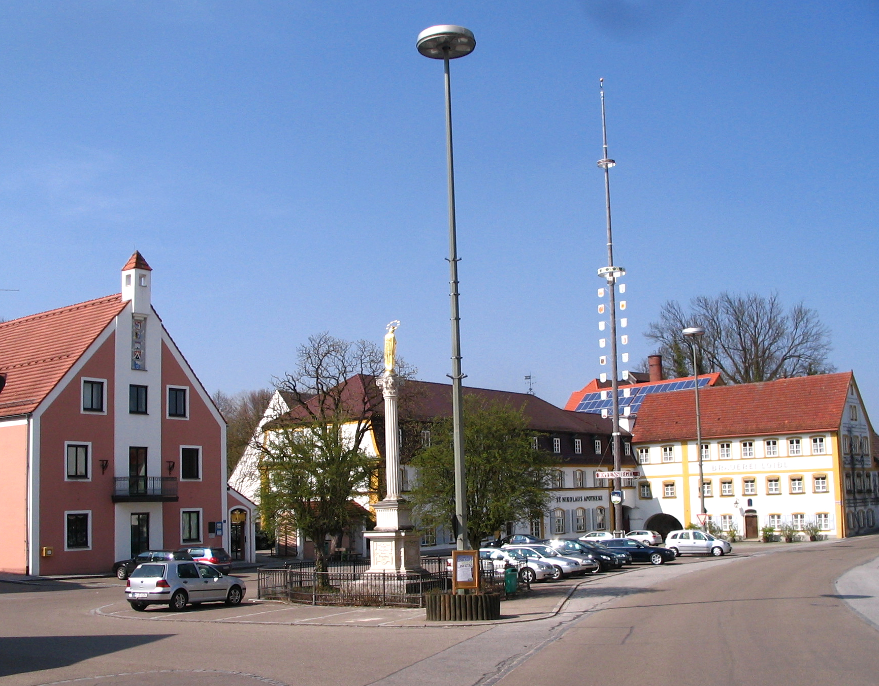 Siegenburg, Landkreis Kelheim, Niederbayern:Marktplatz